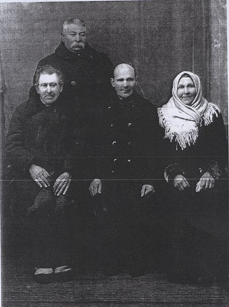 Кніганошы